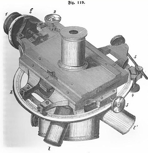 Positionsmikrometer des Fraunhofer-Refraktors (um 1820) der Univ.Sternwarte Wien